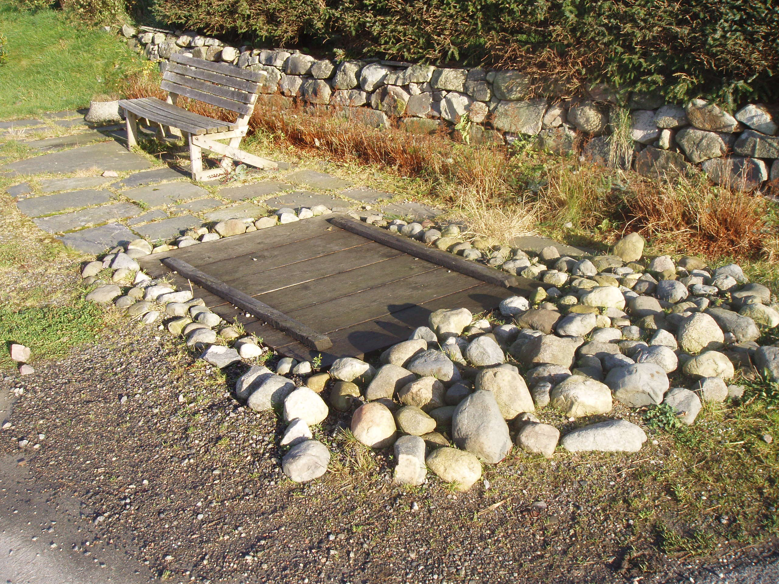 Kongsbrønnen på Fitjar. Brønnen som truleg høyrte til kongsgarden på Fitjar.